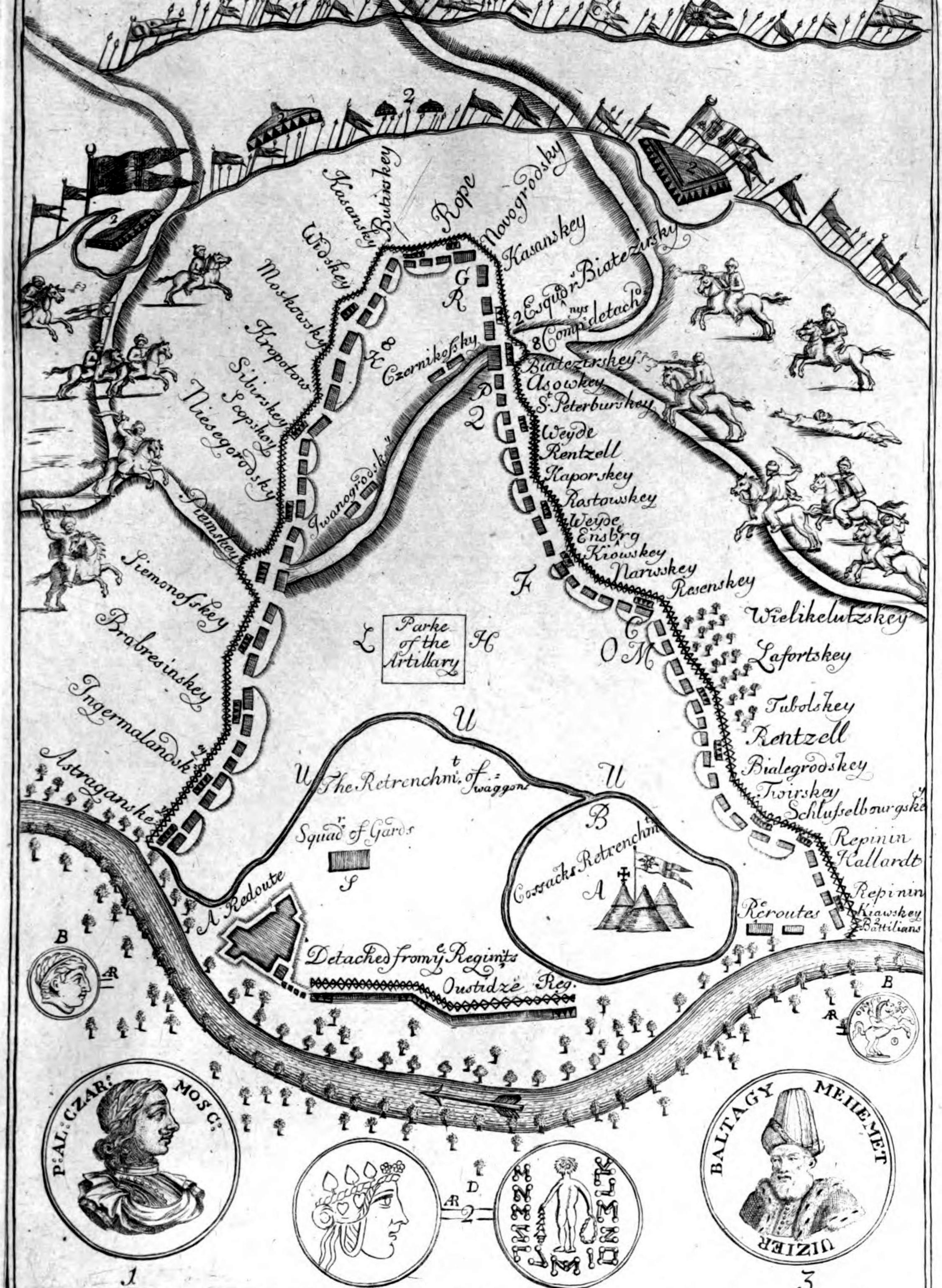 Illustration de la bataille du Prout extrait de: Aubry de la Motraye ou Mottraye, Travels through Europe, Asia, and into part of Africa:with proper cutts and maps : containing a great variety of geographical, topographical, and political observations on those parts of the world, especially on Italy, Turky, Greece, Crim and Noghaian Tartaries, Circassia, Sweden, and Lapland : a curious collection of things particularly rare, both in nature and antiquity, such as remains of antient cities and colonies, inscriptions, idols, medals, minerals, etc. : with an historical account of the most considerable events, London, 1723 Illustrations de William Hogarth (,1697-1764) Battle of Prut